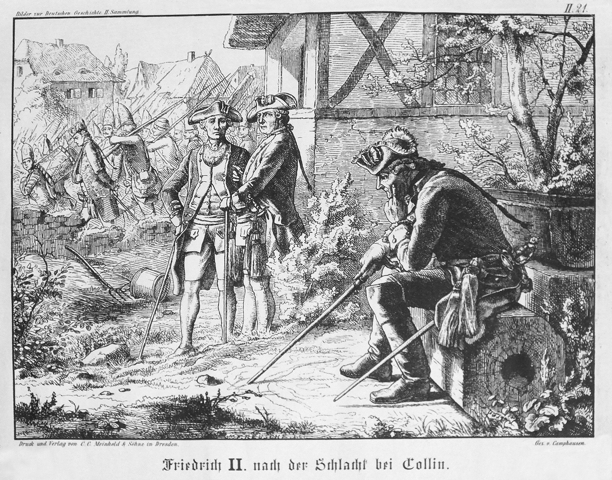 Wilhelm Camphausen: Friedrich II. nach der Schlacht bei Collin (Kolin), in der Mitte Oberst von Seydlitz und General von Tauentzien